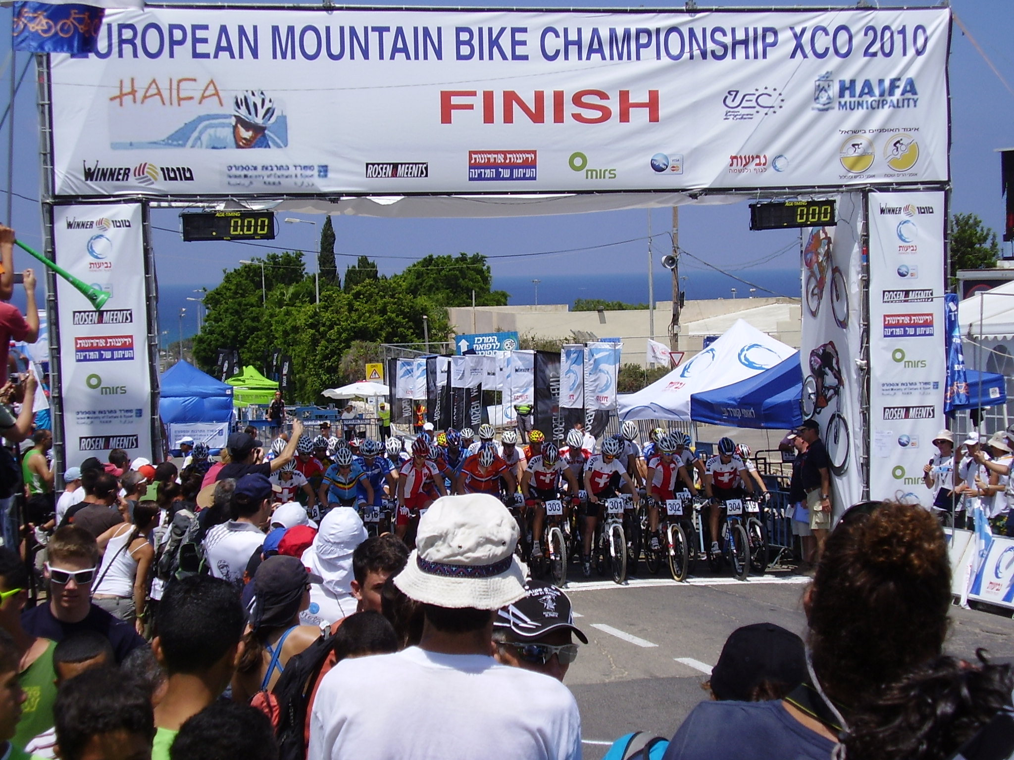 Start of U23 men race, European championship XCO 2010, Haifa, Israel